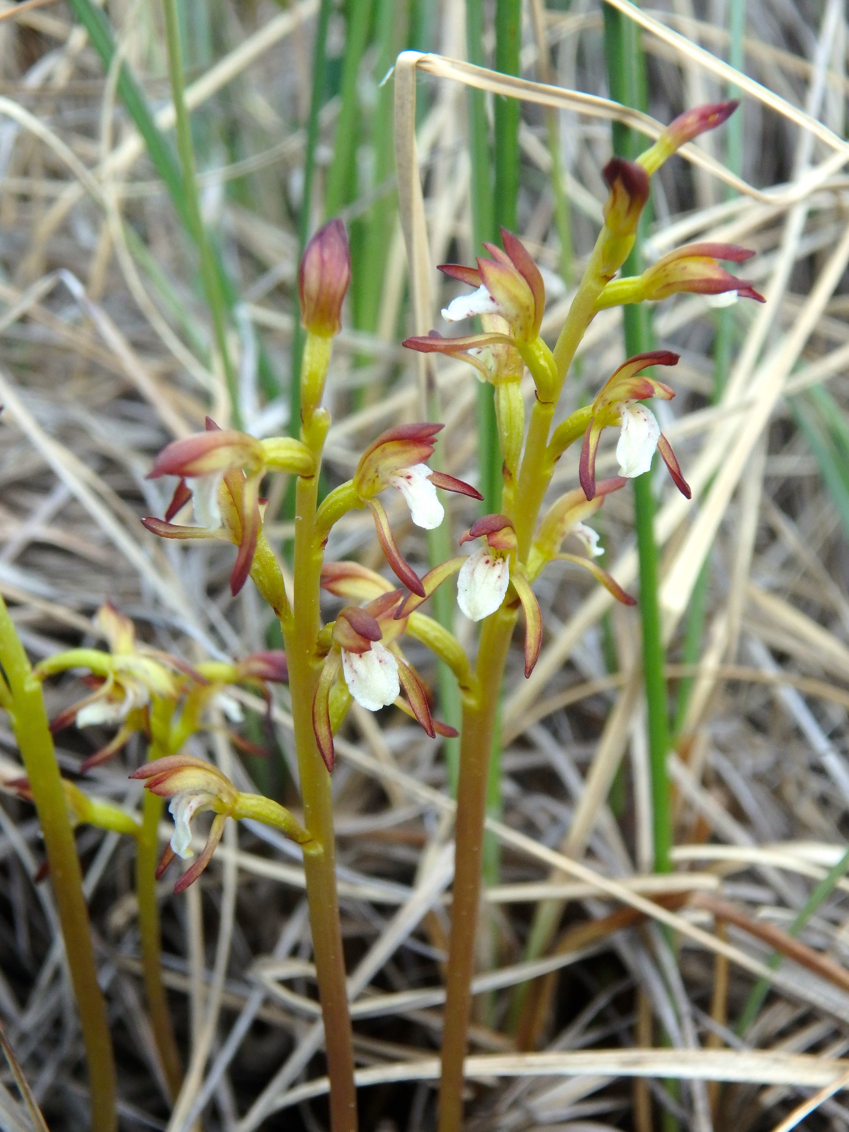 Colorhiza trifida